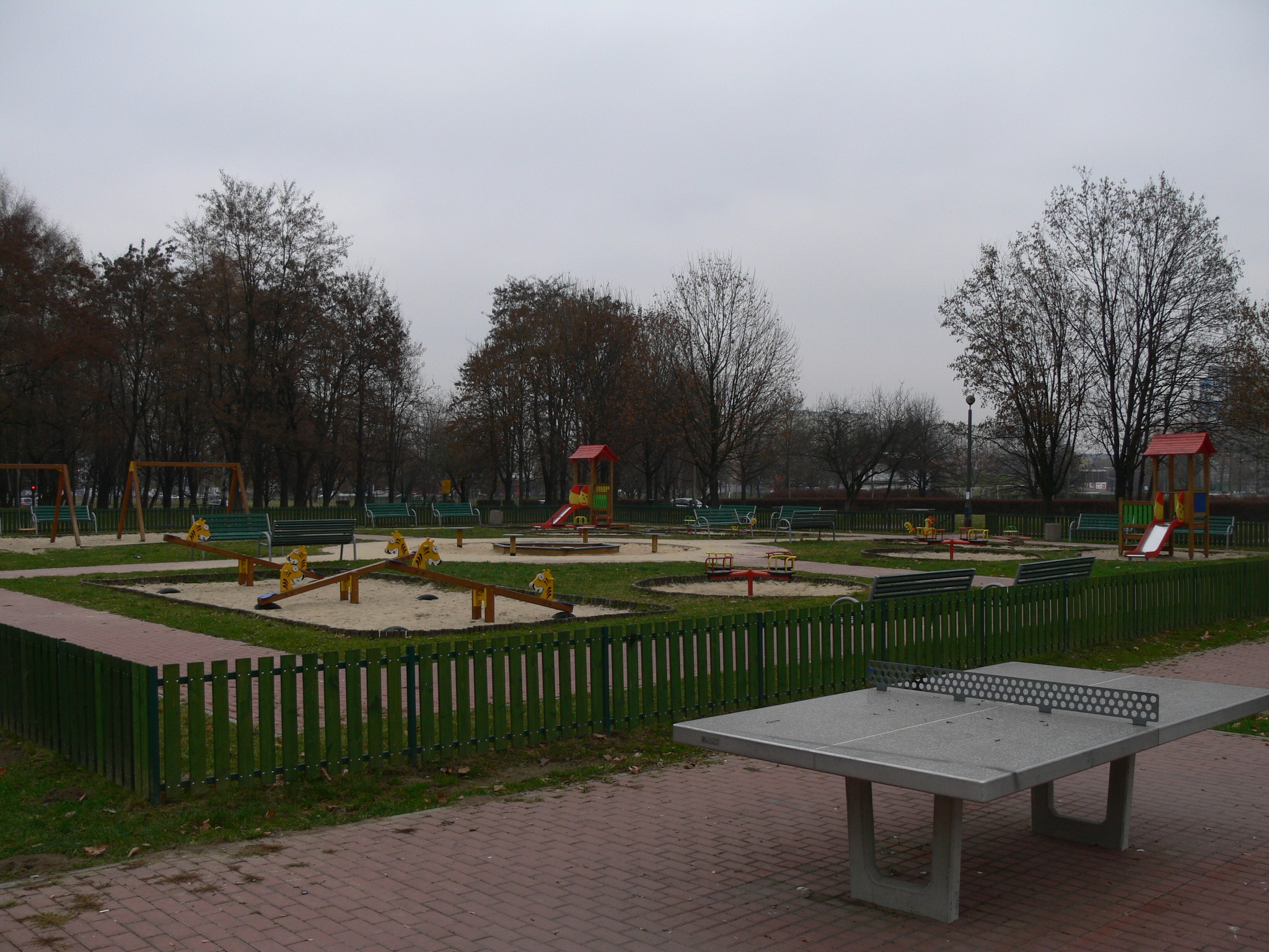 Park Krowoderski - ogród jordanowski i obiekty małej architektury